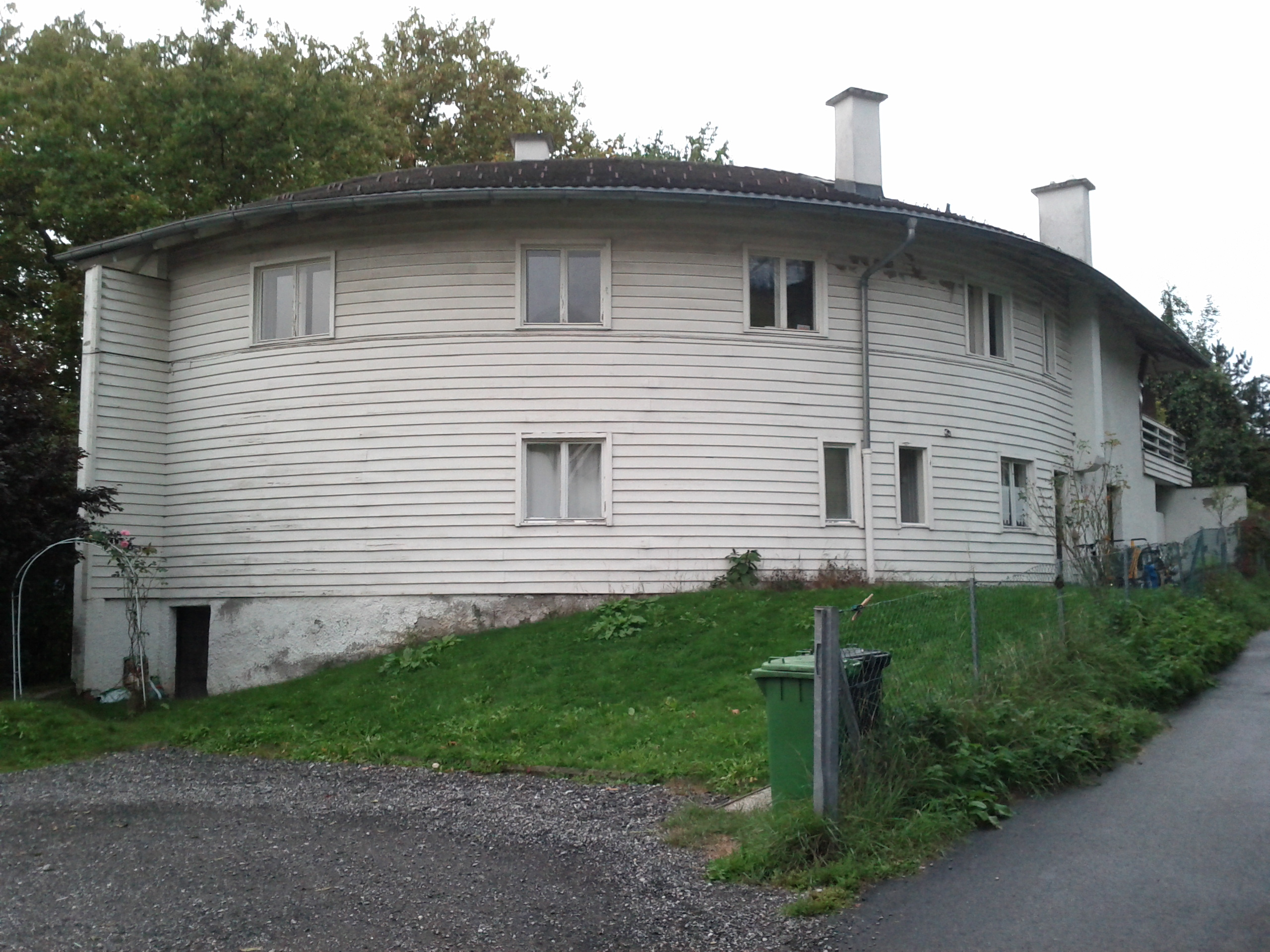 Haus Proxauf This media shows the remarkable cultural object in the Austrian state of Tyrol listed by the Tyrolean Art Cadastre with the ID 116278. (on tirisMaps, pdf, more images on Commons, Wikidata)